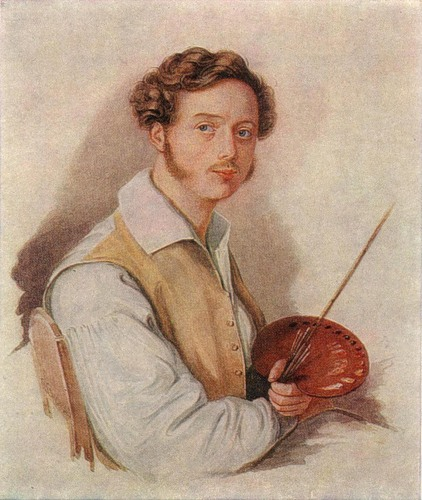 Яков Максимович Андреевич 2-ой (1801-1840) — подпоручик, декабрист